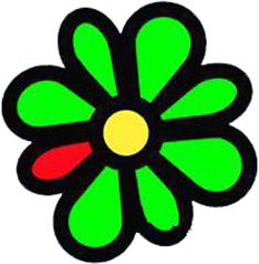 ICQ-Icon